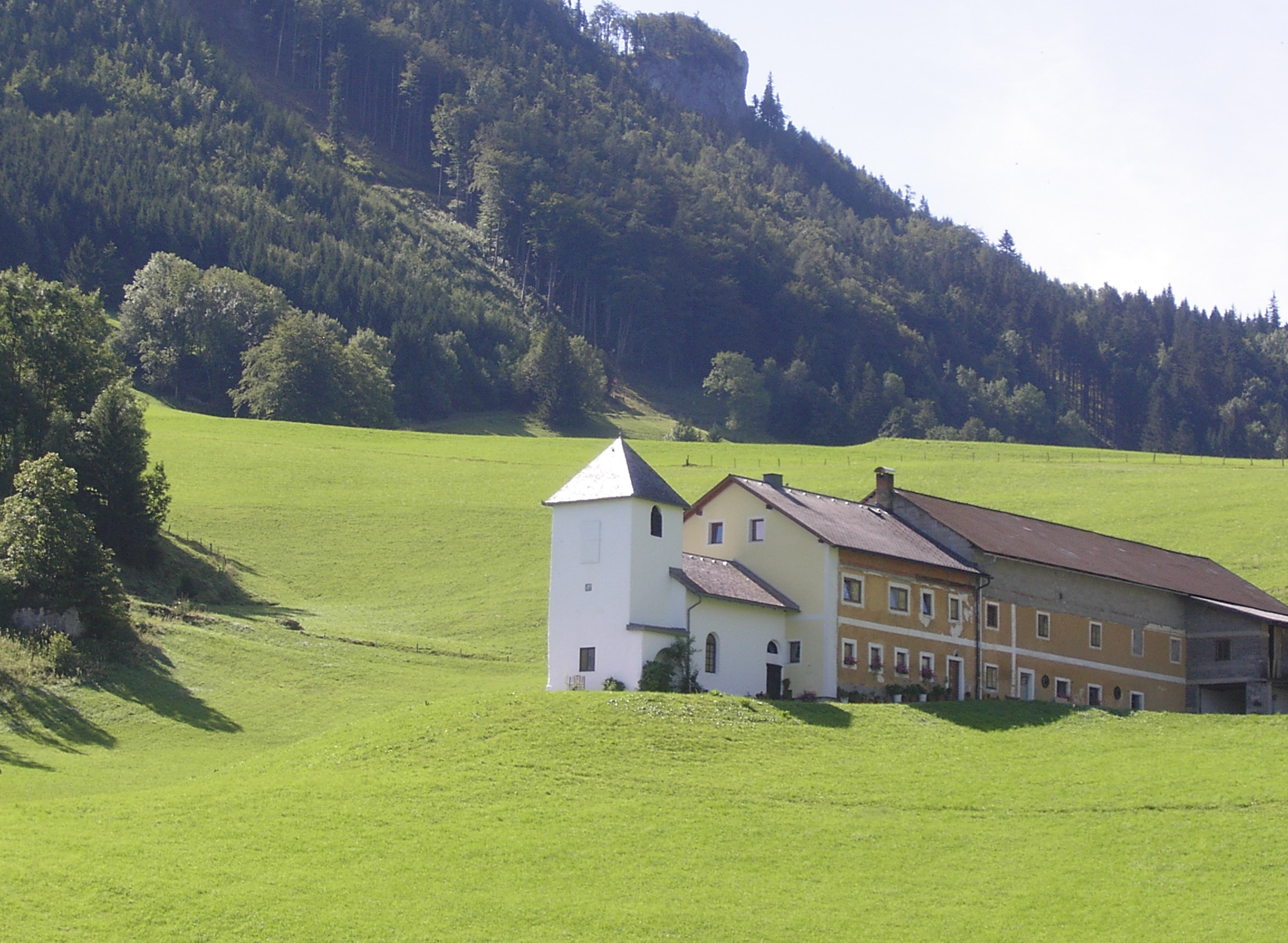 Gaflenz Zöttl-Kapelle Großgeschnaidt 9